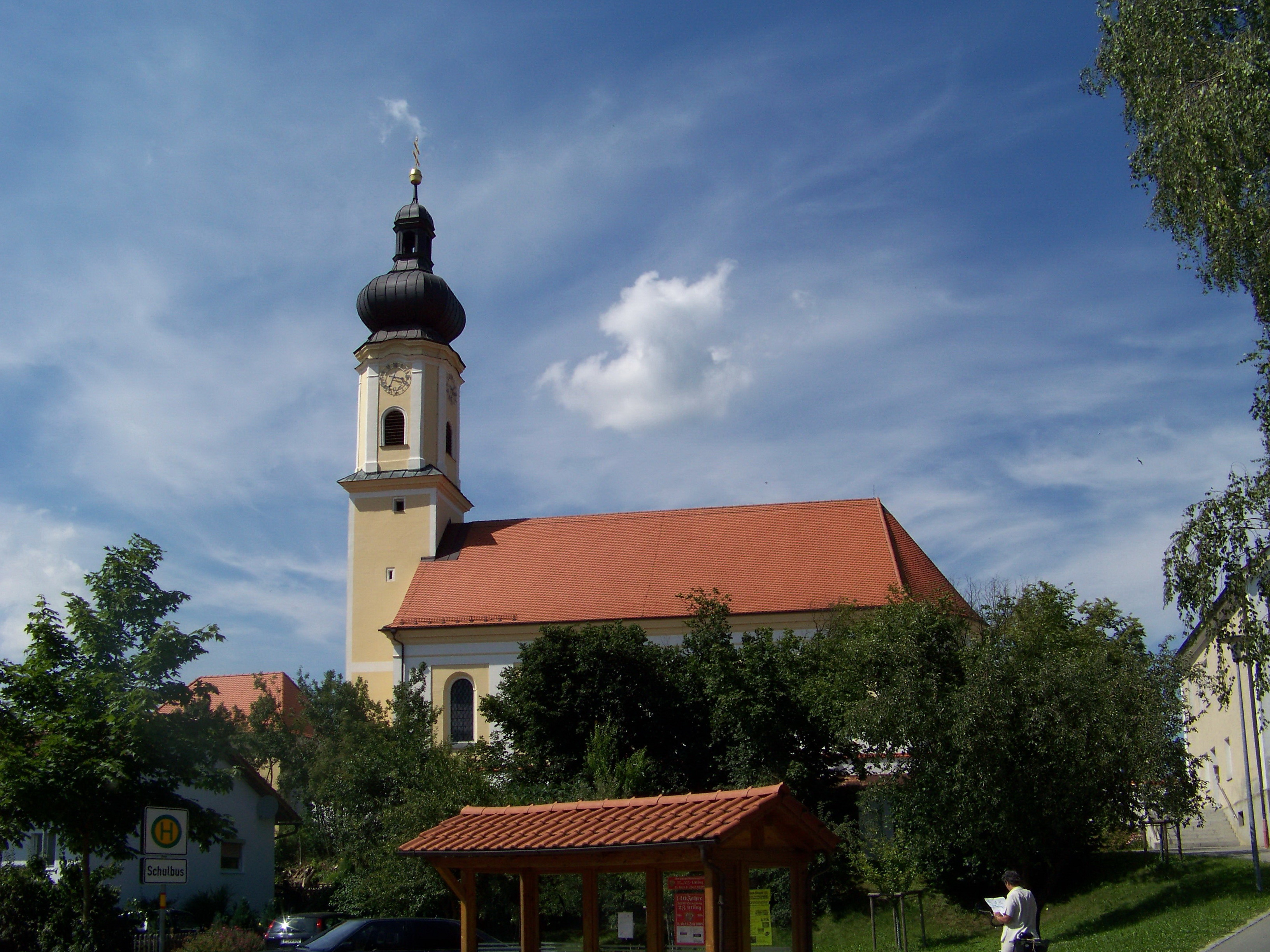 Irlbach, Kirchberg 2. Katholische Pfarrkirche Mariae Himmelfahrt, einheitlicher Bau von 1734; mit Ausstattung.